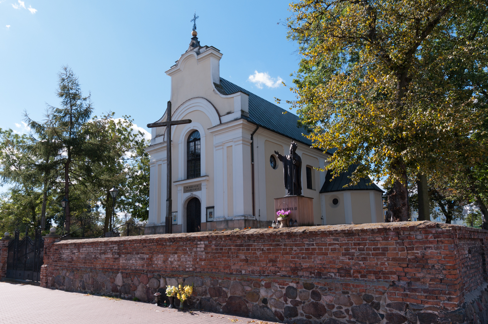 Góra Kalwaria, ul. Dominikańska - kościół p.w. Podwyższenia Krzyża, tzw. Dom Piłata, widok od frontu płn-wsch. strony (zabytek nr 1018/365/62)